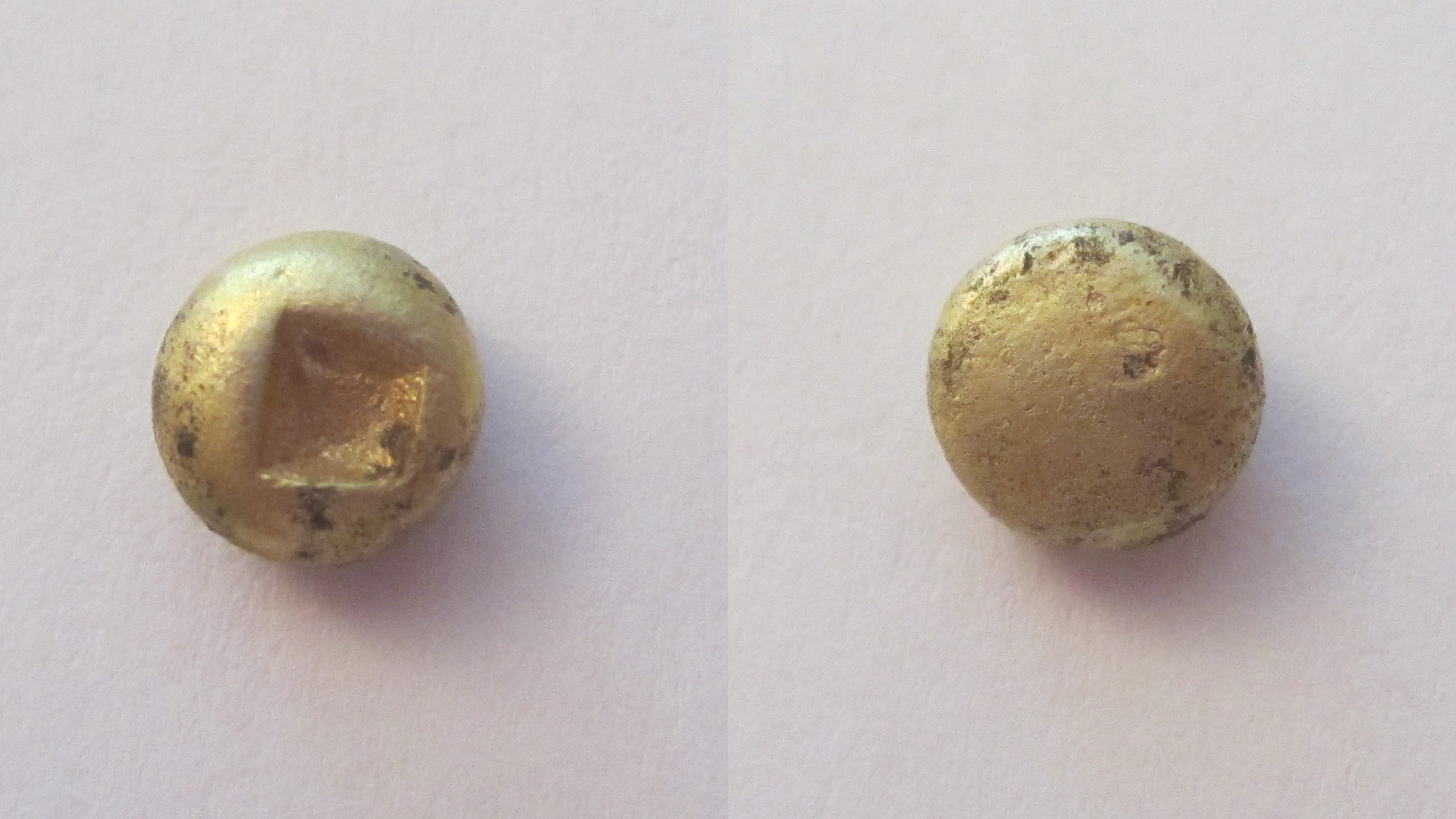 Douzième de statère 1,09 gramme Etalon milésiaque. Revers : carré creux de forme pyramidal.